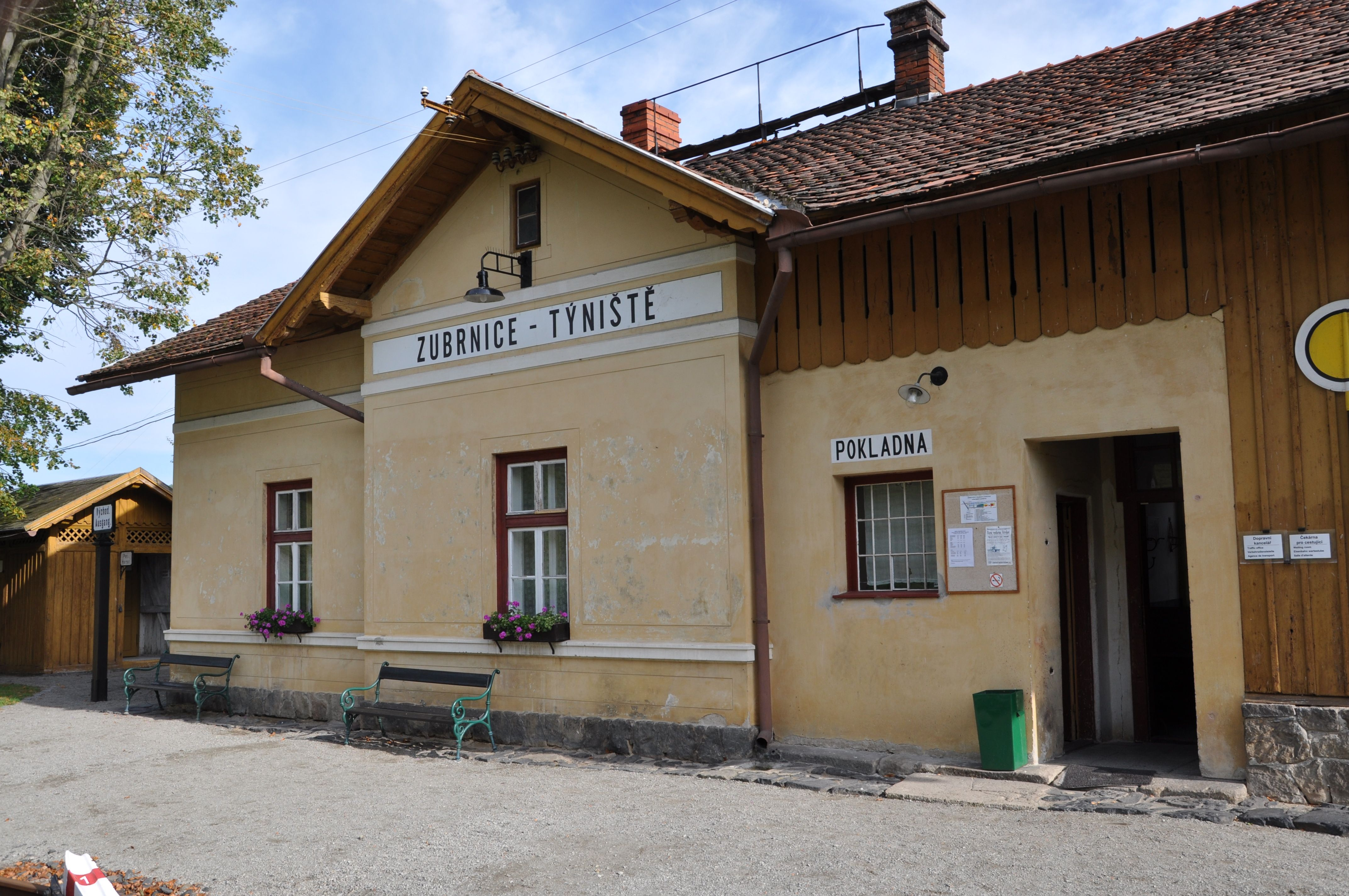 Stanice Zubrnice